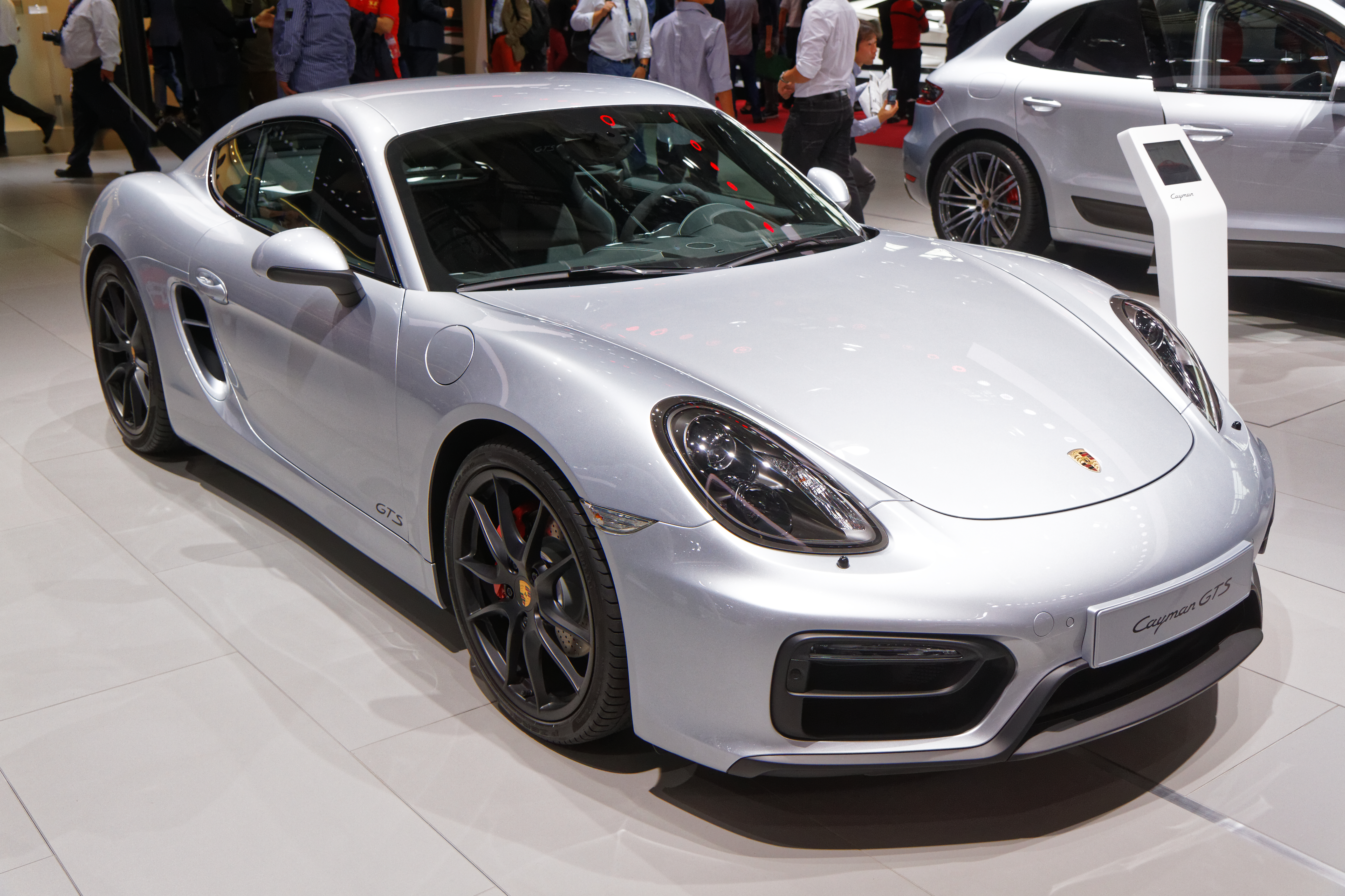 Une Porsche Cayman GTS présentée lors du mondial de l'automobile de Paris 2014.